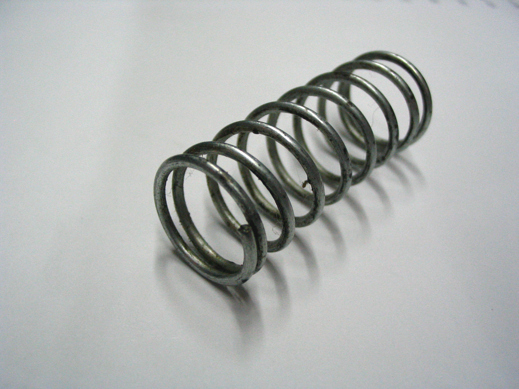 Spring